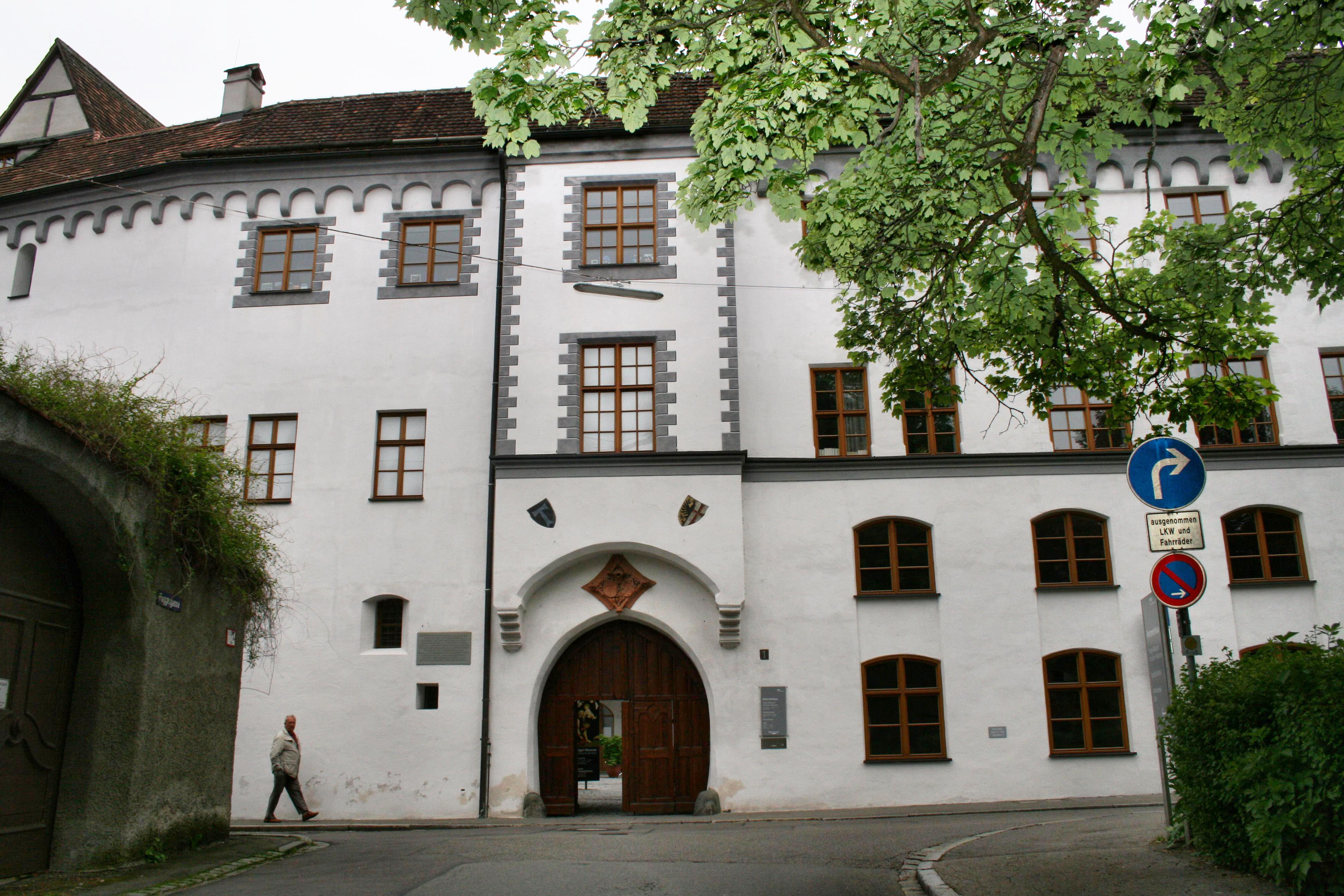 Memmingen, Eingang zum Antonierkloster